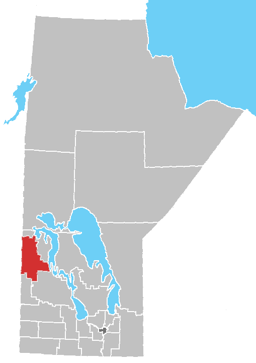 Manitoba census area No. 20